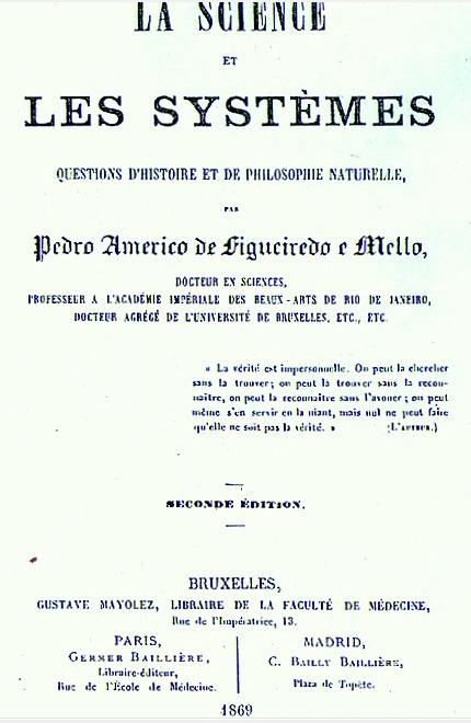 Capa da tese de doutorado de Pedro Américo - A Ciência e os Sistemas, em sua edição francesa original